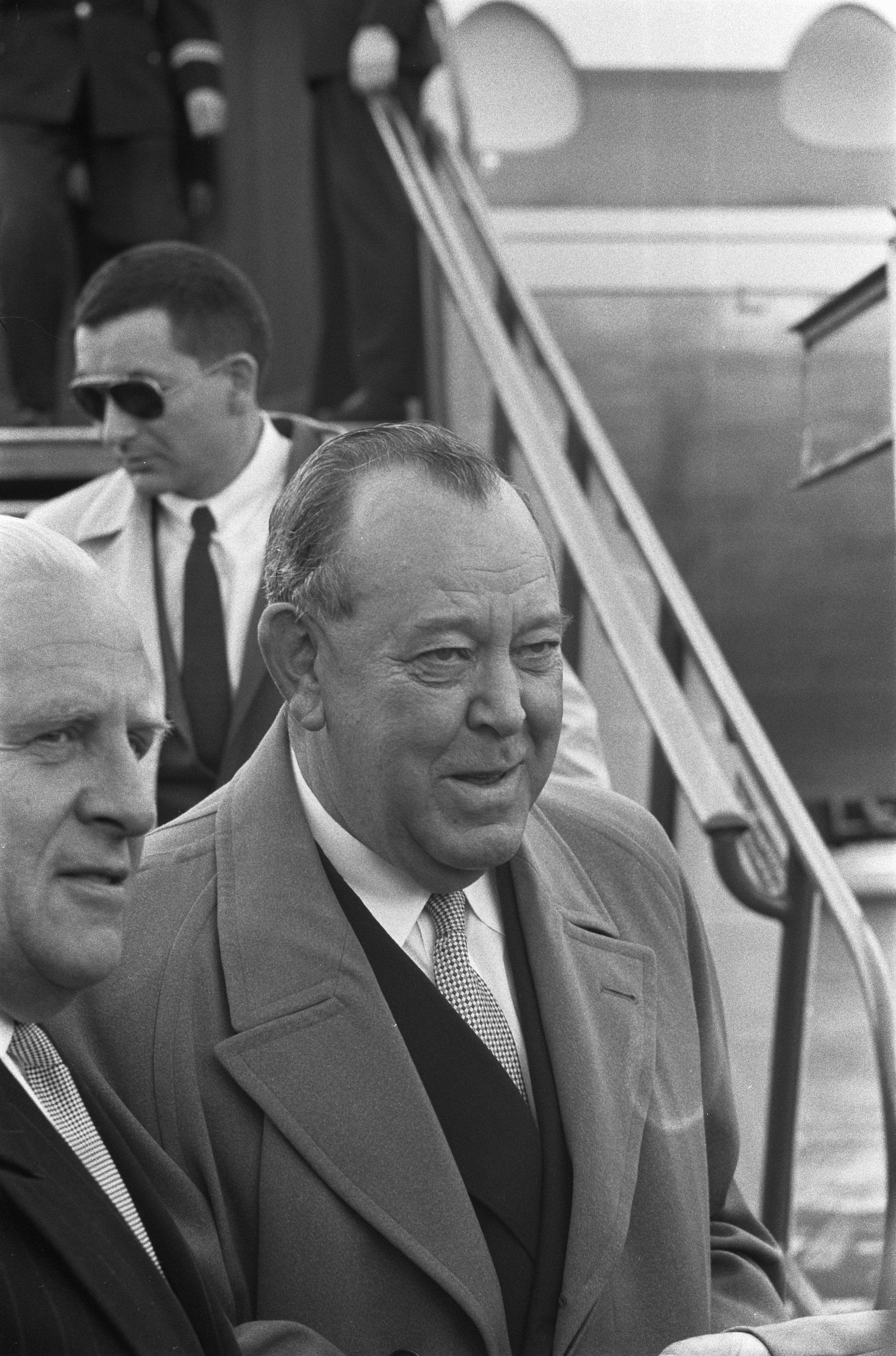 Collectie / Archief : Fotocollectie Anefo Reportage / Serie : [ onbekend ] Beschrijving : Aankomst van Trygve Lie op Schiphol voor 5-daagse bespreking Datum : 17 oktober 1960 Locatie : Noord-Holland, Schiphol Trefwoorden : aankomsten, besprekingen Persoonsnaam : Trygve Lie Fotograaf : Pot, Harry / Anefo Auteursrechthebbende : Nationaal Archief Materiaalsoort : Negatief (zwart/wit) Nummer archiefinventaris : bekijk toegang 2.24.01.05 Bestanddeelnummer : 911-6760